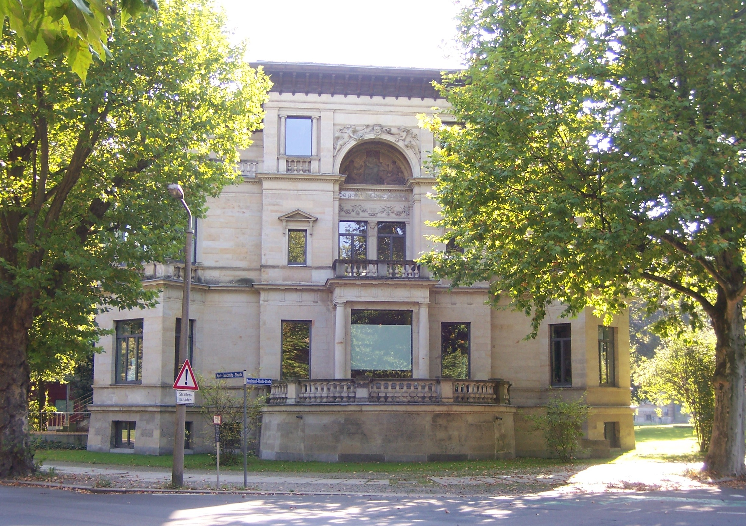 Stadtvilla Familie Herfurth Leipzig